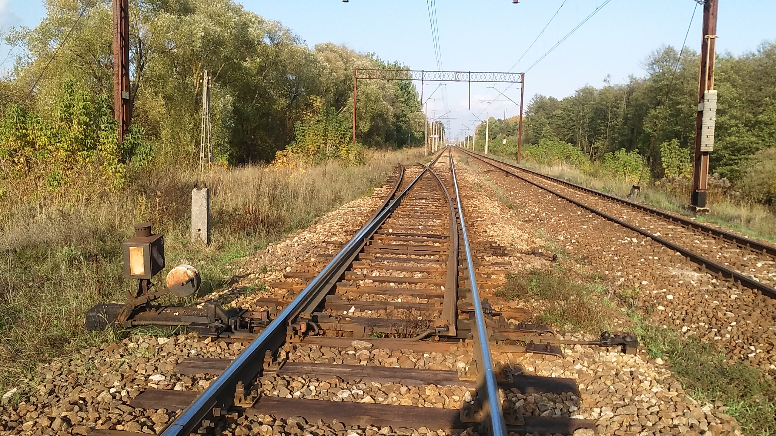 Linia kolejowa nr 516 - posterunek odgałęźny Turczyn, połączenie z linią nr 6